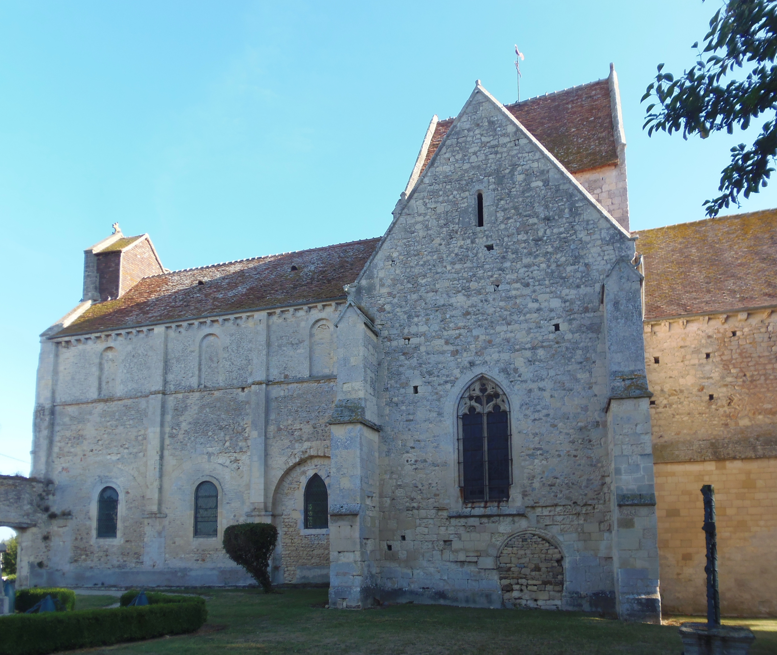 Perrières (Normandie, France). L'église Saint-Vigor.